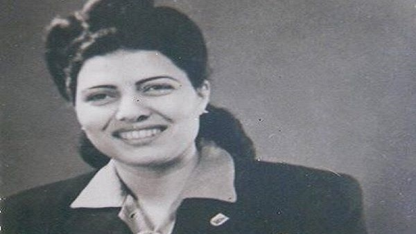 سميرة موسى